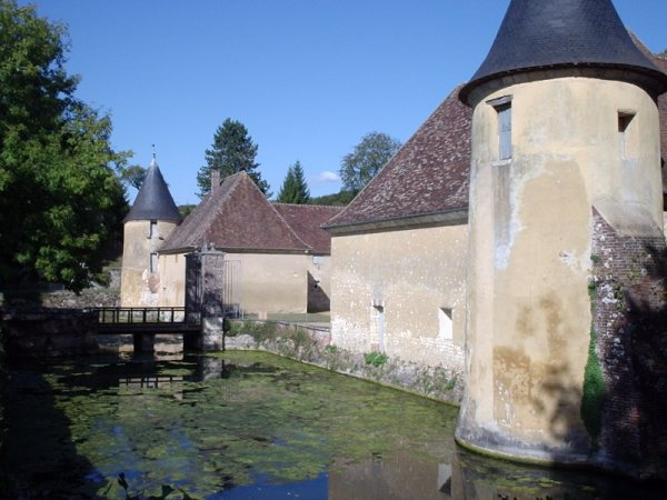 Château de Bézu-la-Forêt en septembre 2009.